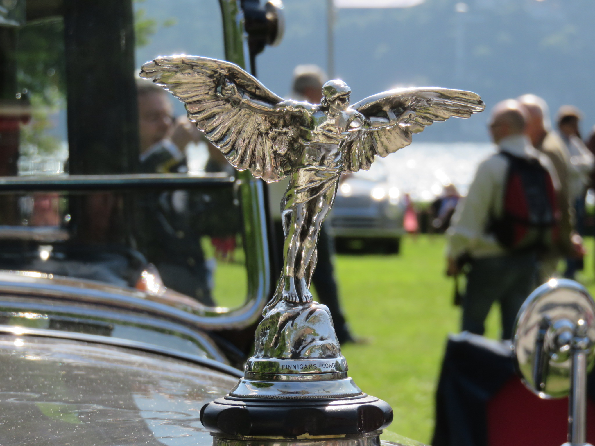 Mascotte de bouchon de radiateur en hommage au pilote Alberto Santos-Dumont, de Farman A6B Coupé de Ville Million-Guiet, 1925, concours d'élégance Villa d'Este 2015